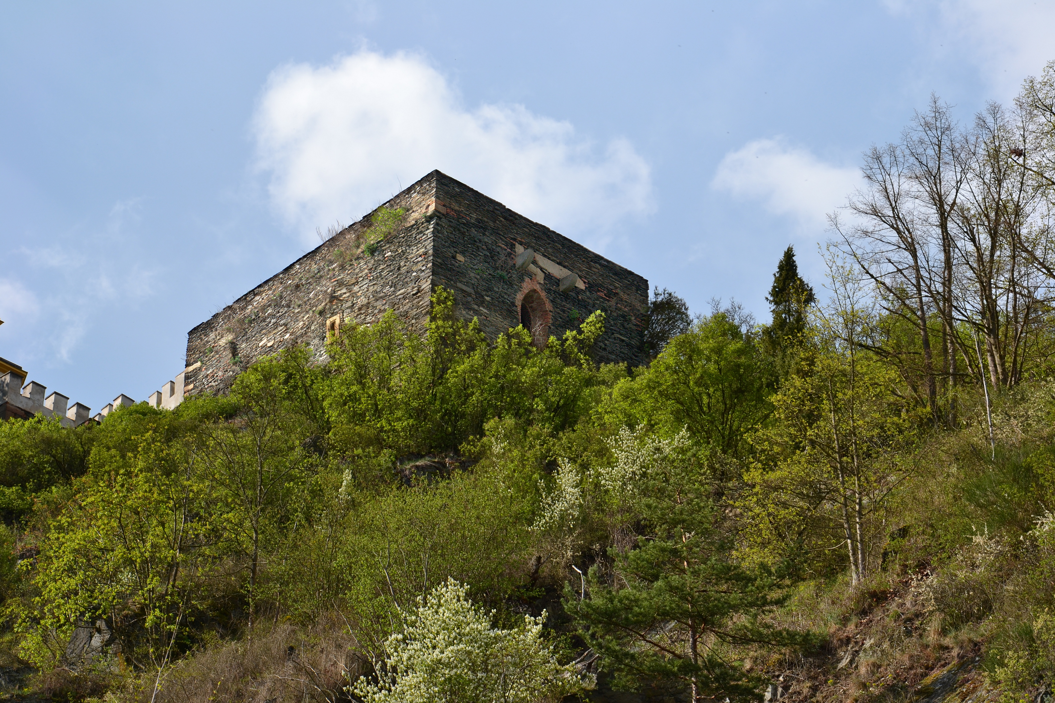 Rabštejn nad Střelou - gotická budova v jihovýchodním nároží hradu